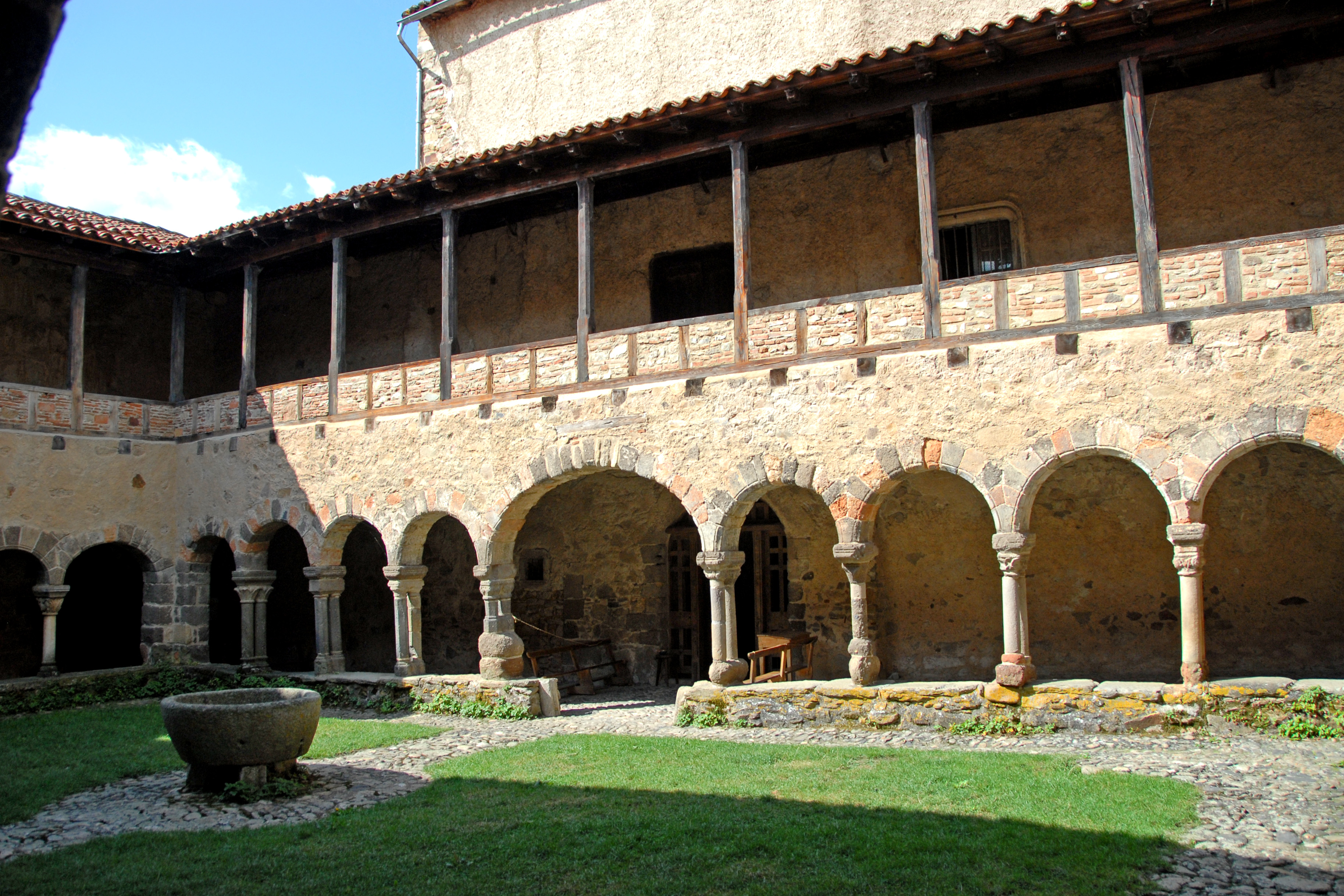 Abtei St.-André Lavaudieu, Kreuzgang, Westgalerie vor Nachbargebäude